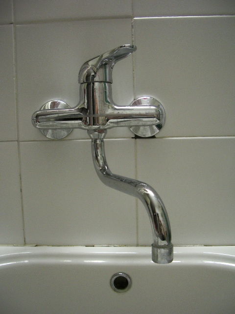 Llave de paso o grifo de tipo monomando, que permite mezclar agua fría y caliente y regular el caudal con un único mando.